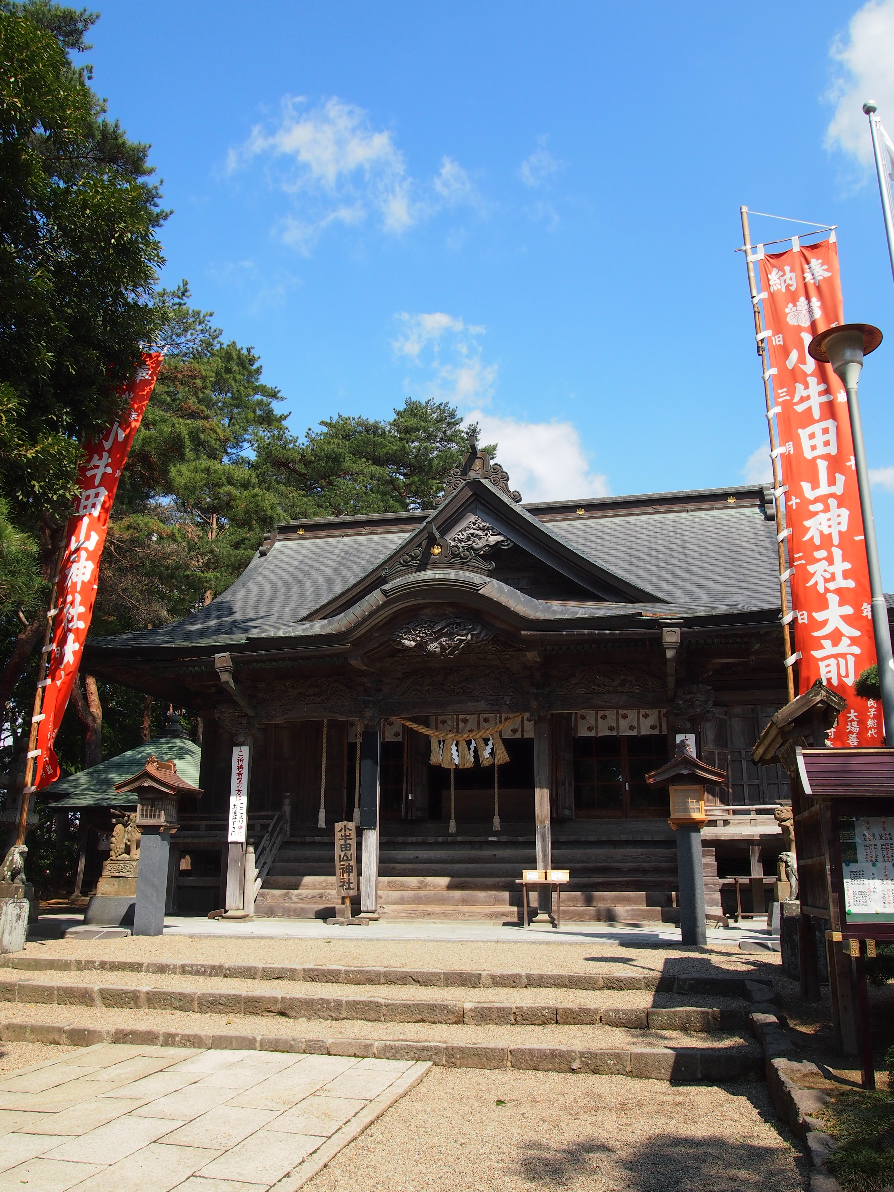 小牛田山神社拝殿